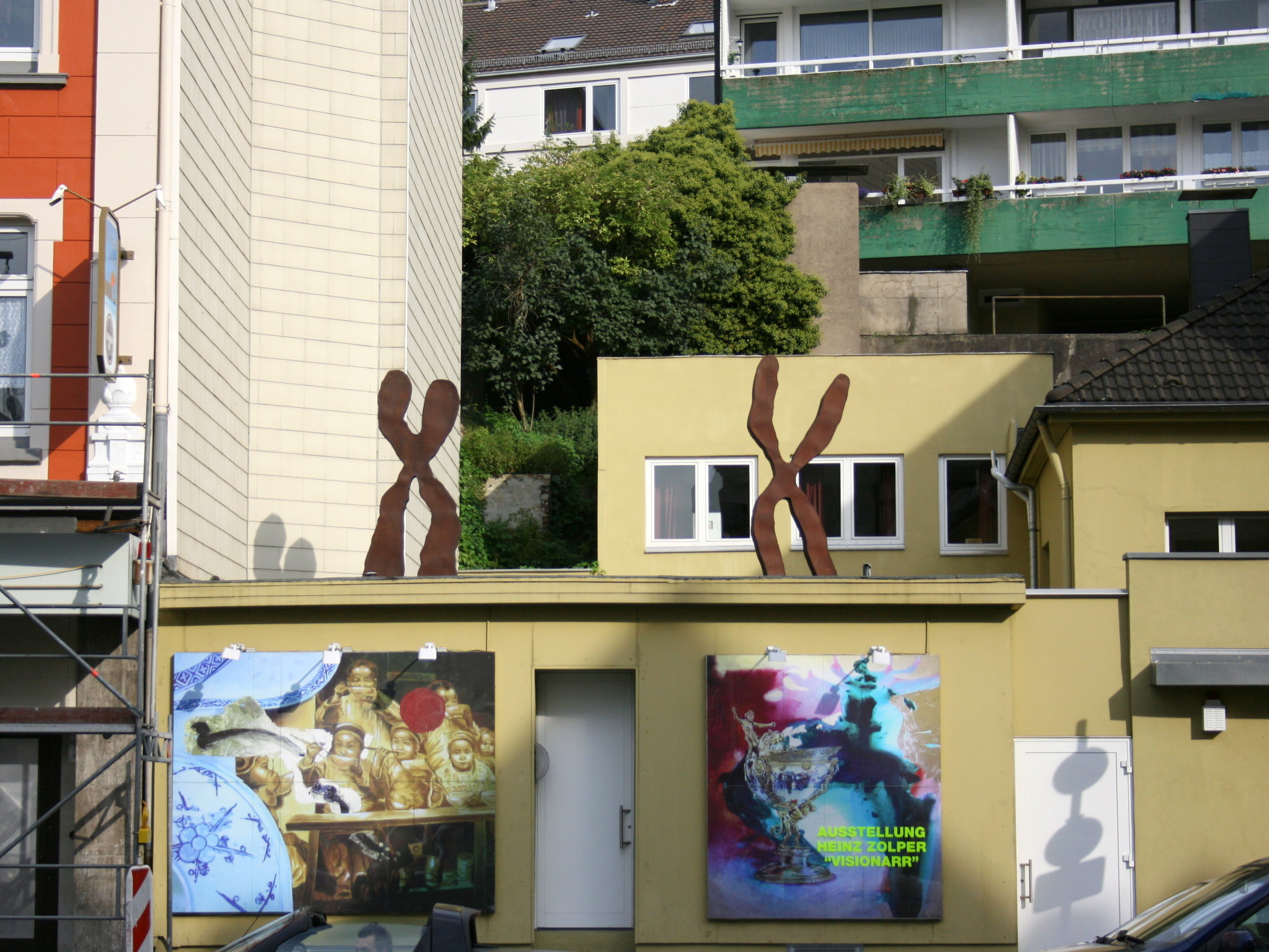 Gathe in Wuppertal-Elberfeld, auf dem Dach: Skulpturen von Joachim Röderer